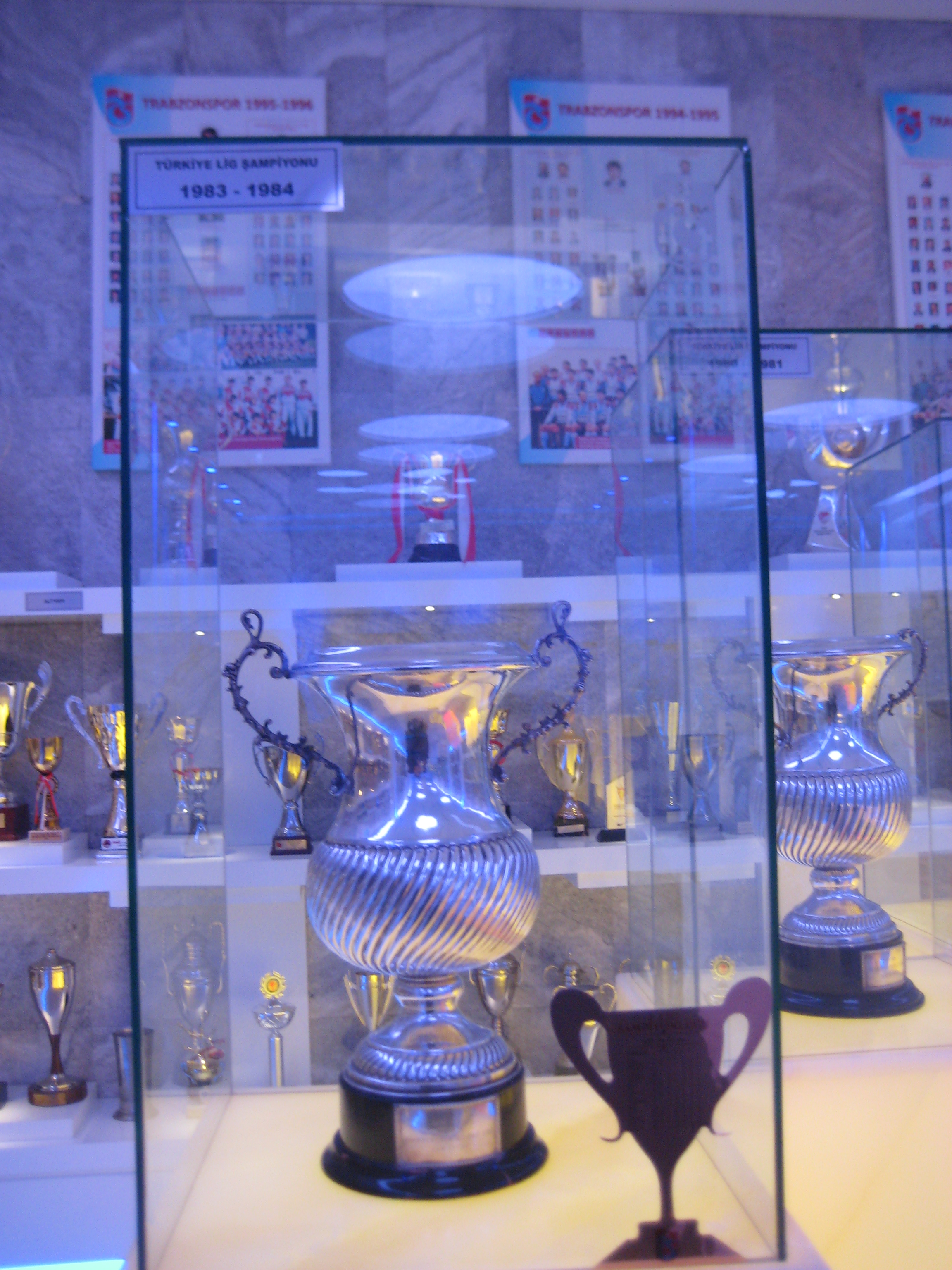 Trabzonspor'un 1983-84 sezonunda kazandığı 1. Lig kupası.